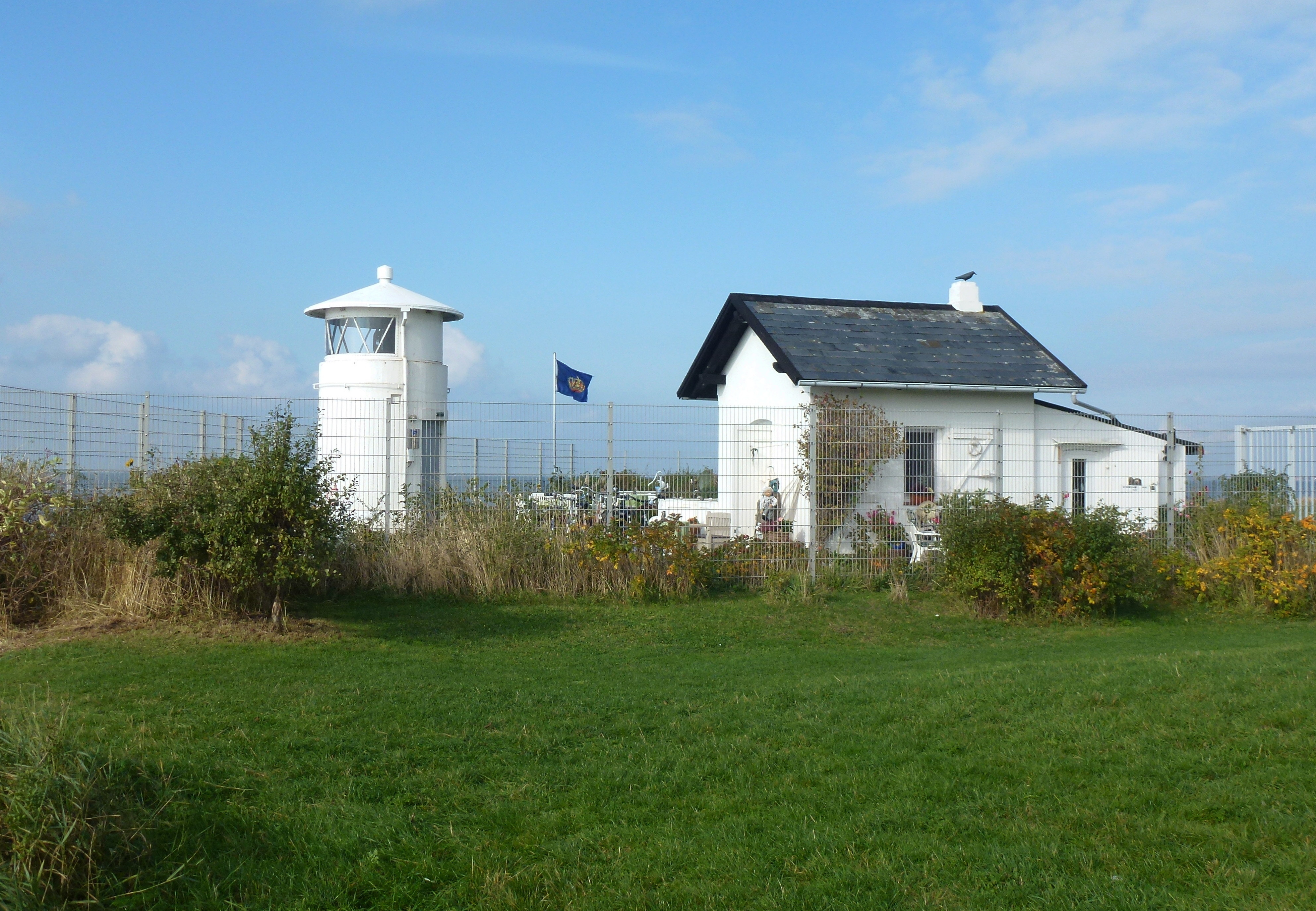 Leuchtturm Strukkamphuk